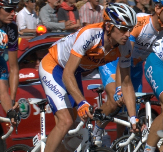 Denis Menchov en 2009